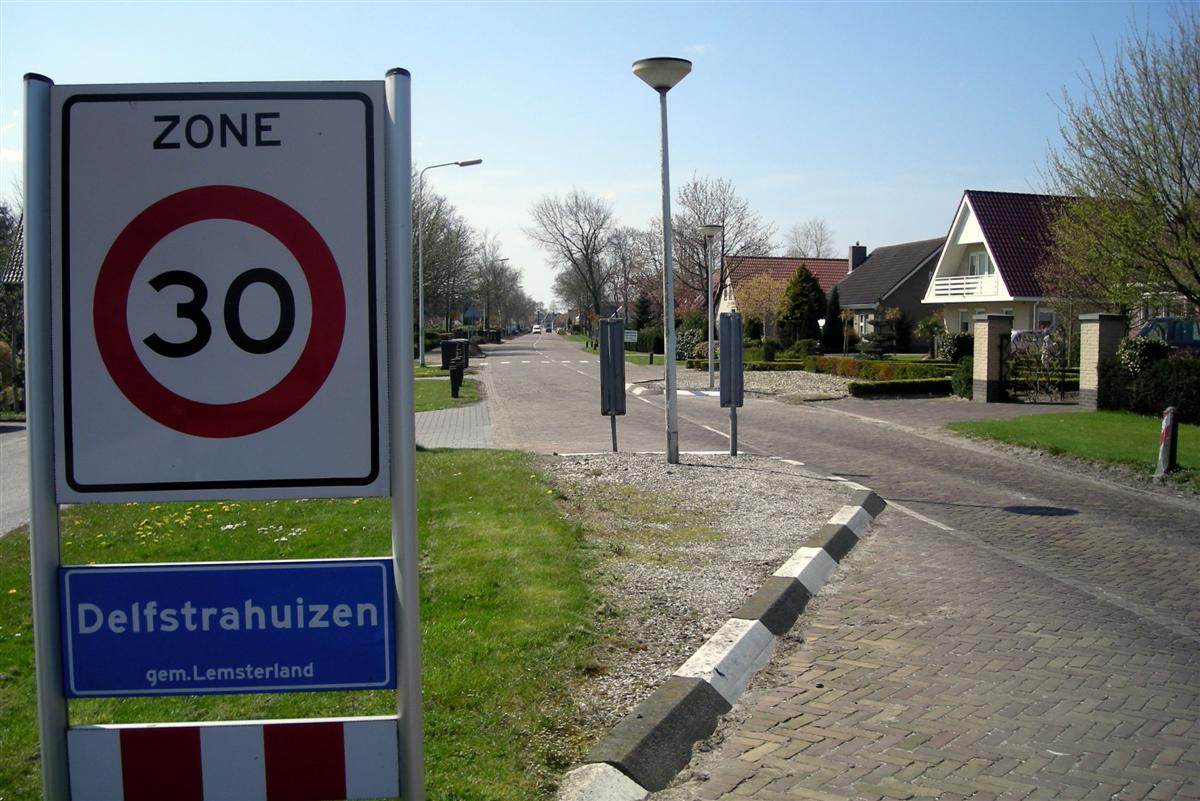 Delfstrahuizen